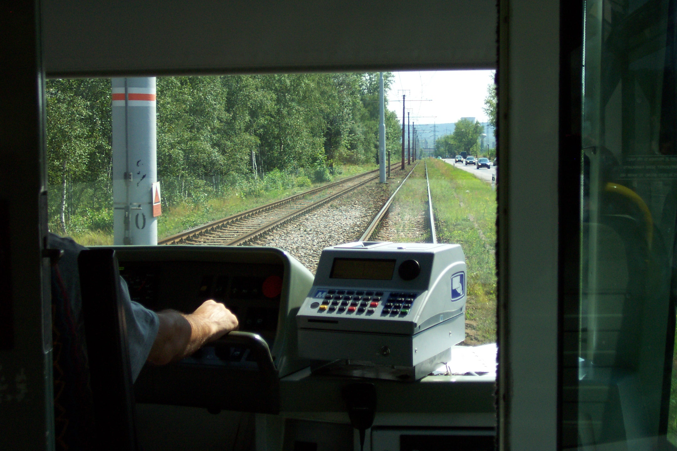 Litvínov, tram driver's wiev on a track leading to Most - Litvínov, výhled řidiče tramvaje na trať vedoucí do Mostu